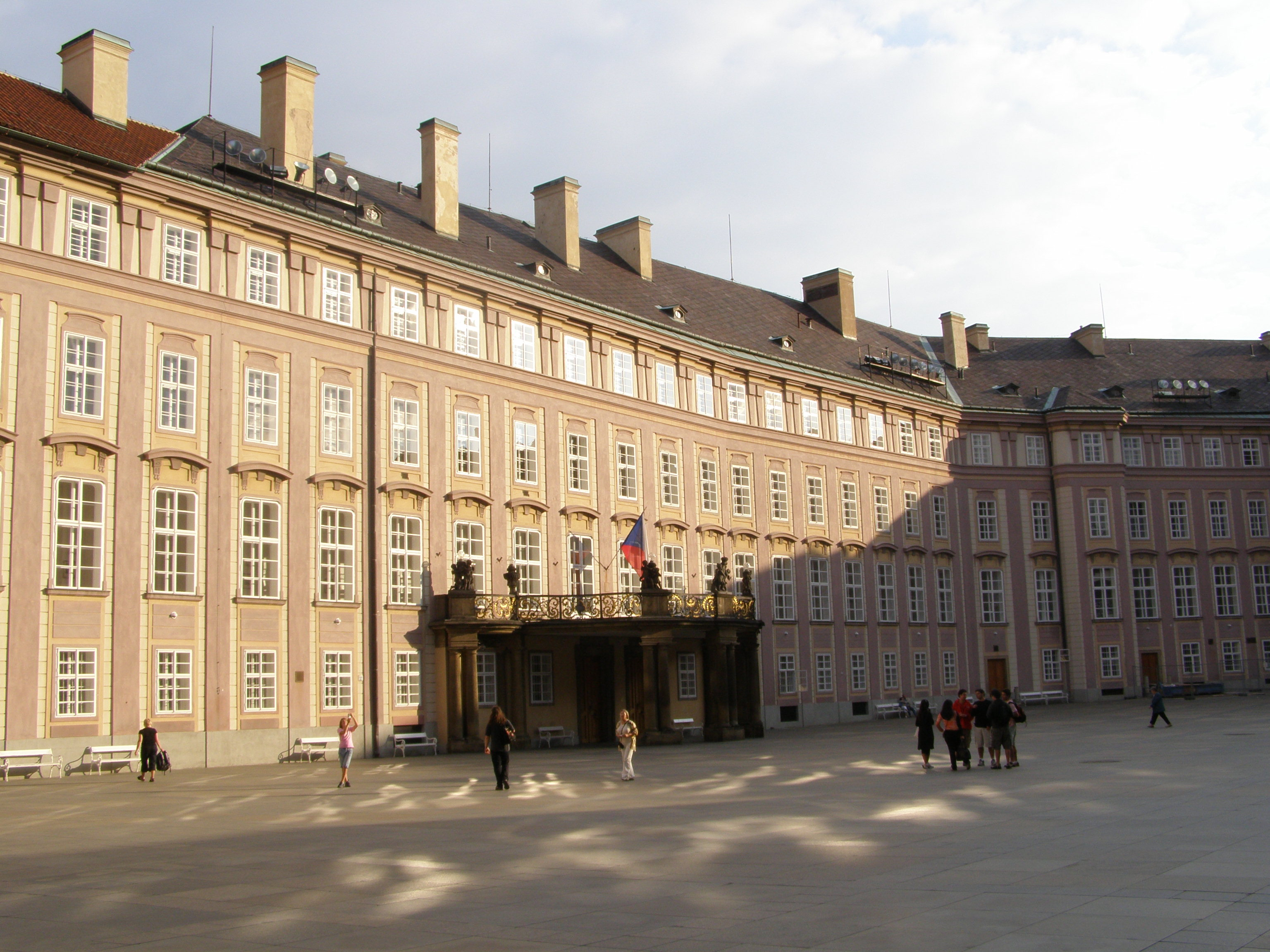 Pražský hrad, 3. hradní nádvoří, Nový královský palác - Městský trakt